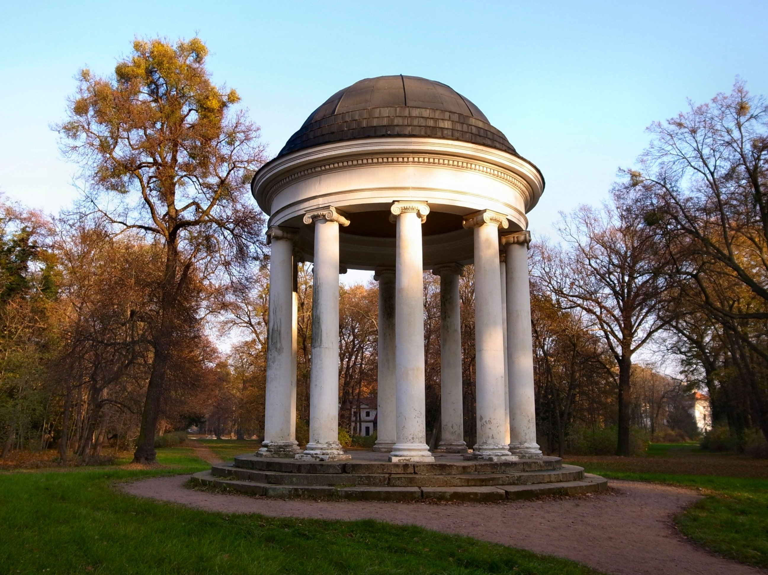 Dessau, Der Ionische Tempel im Georgium